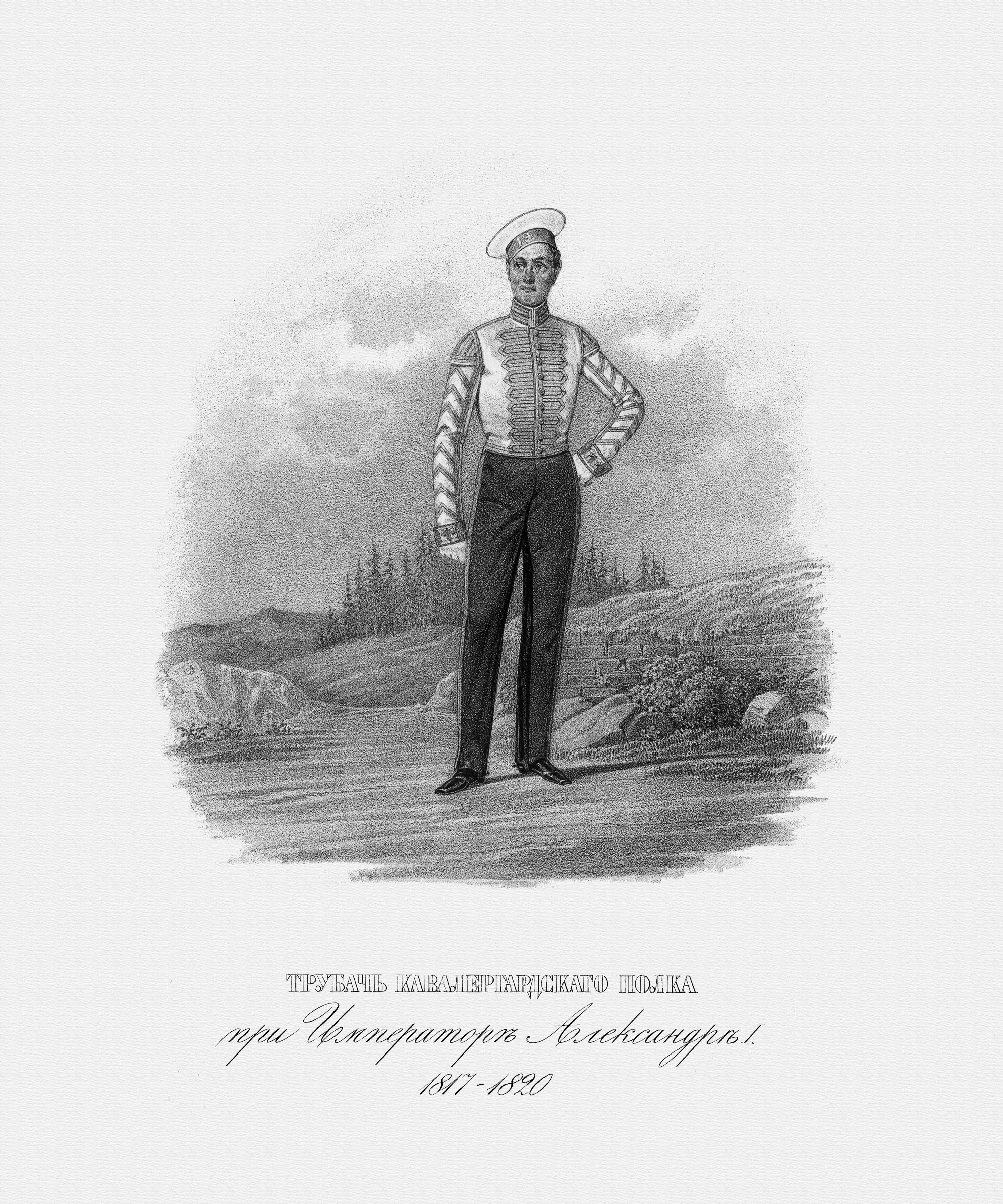 Litographie représentant un uniforme du régiment russe des Chevaliers Gardes sous l'empereur Alexandre 1er.